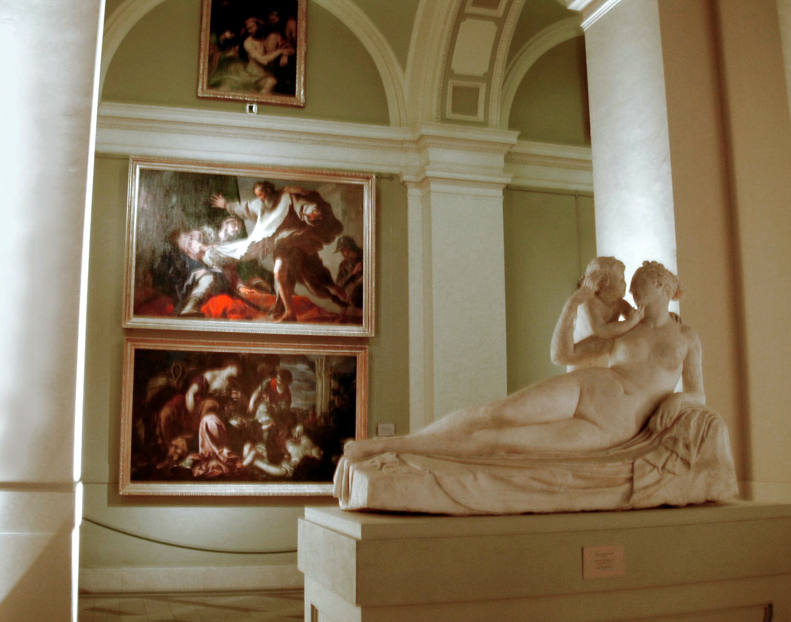 Szépművészeti Múzeum, Budapest Museum of Fine Arts